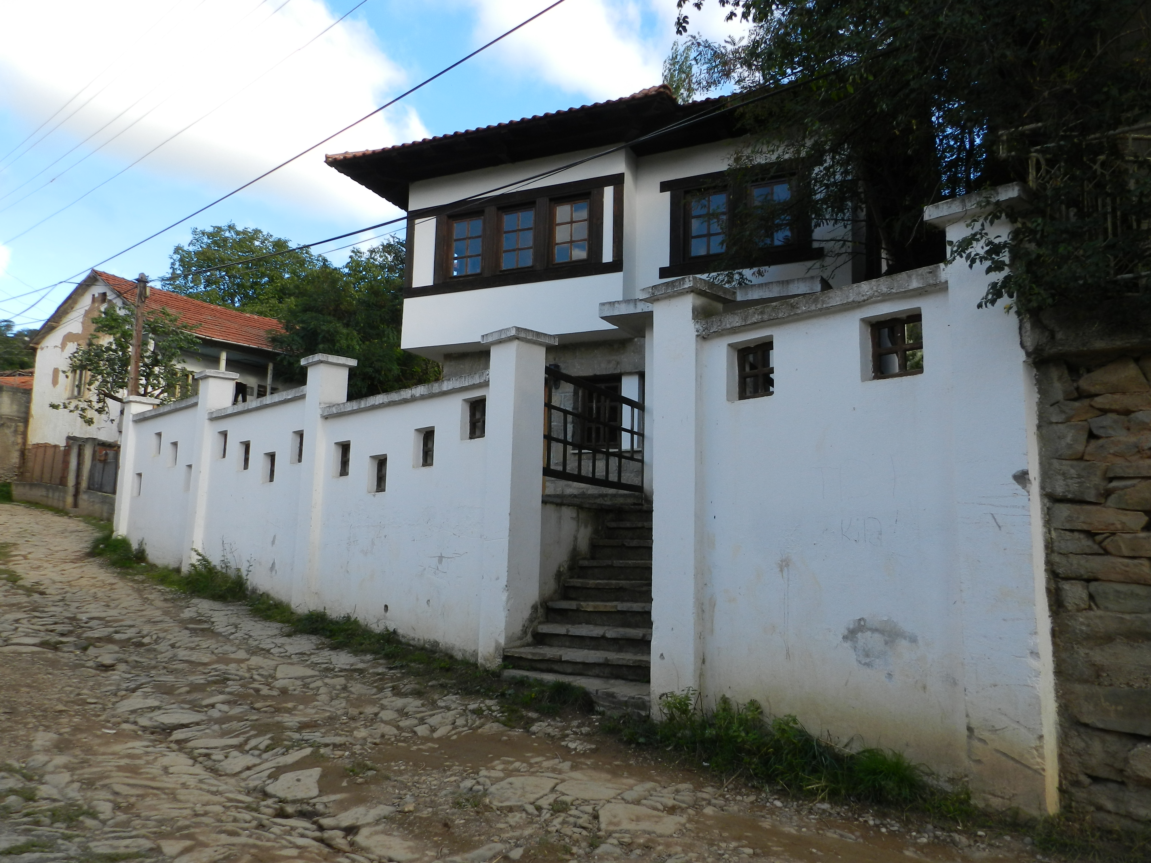 Shtëpia Muze e At Shtjefën Gjeqovit